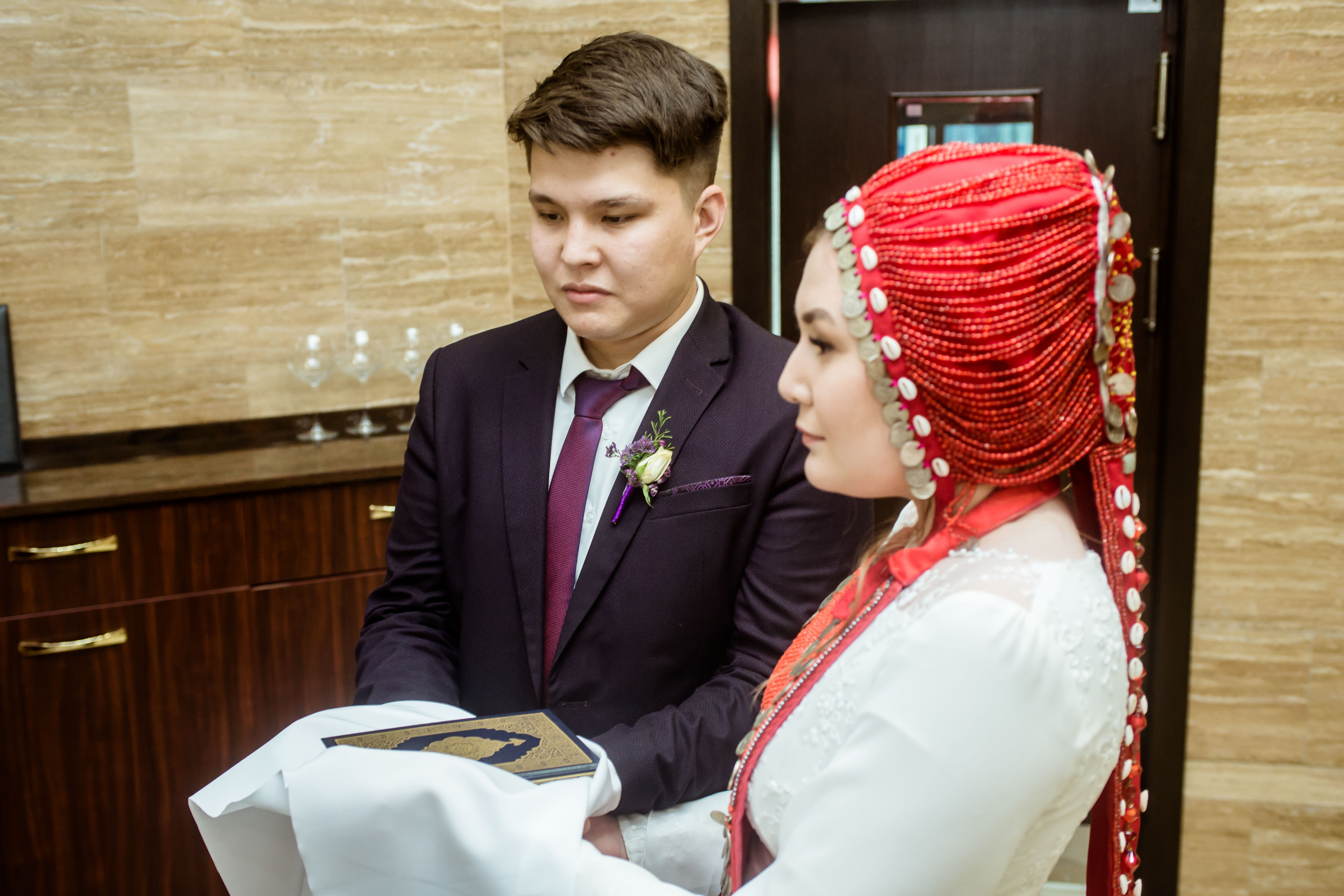 Башҡортса: Башҡорт ғаиләһе никахы